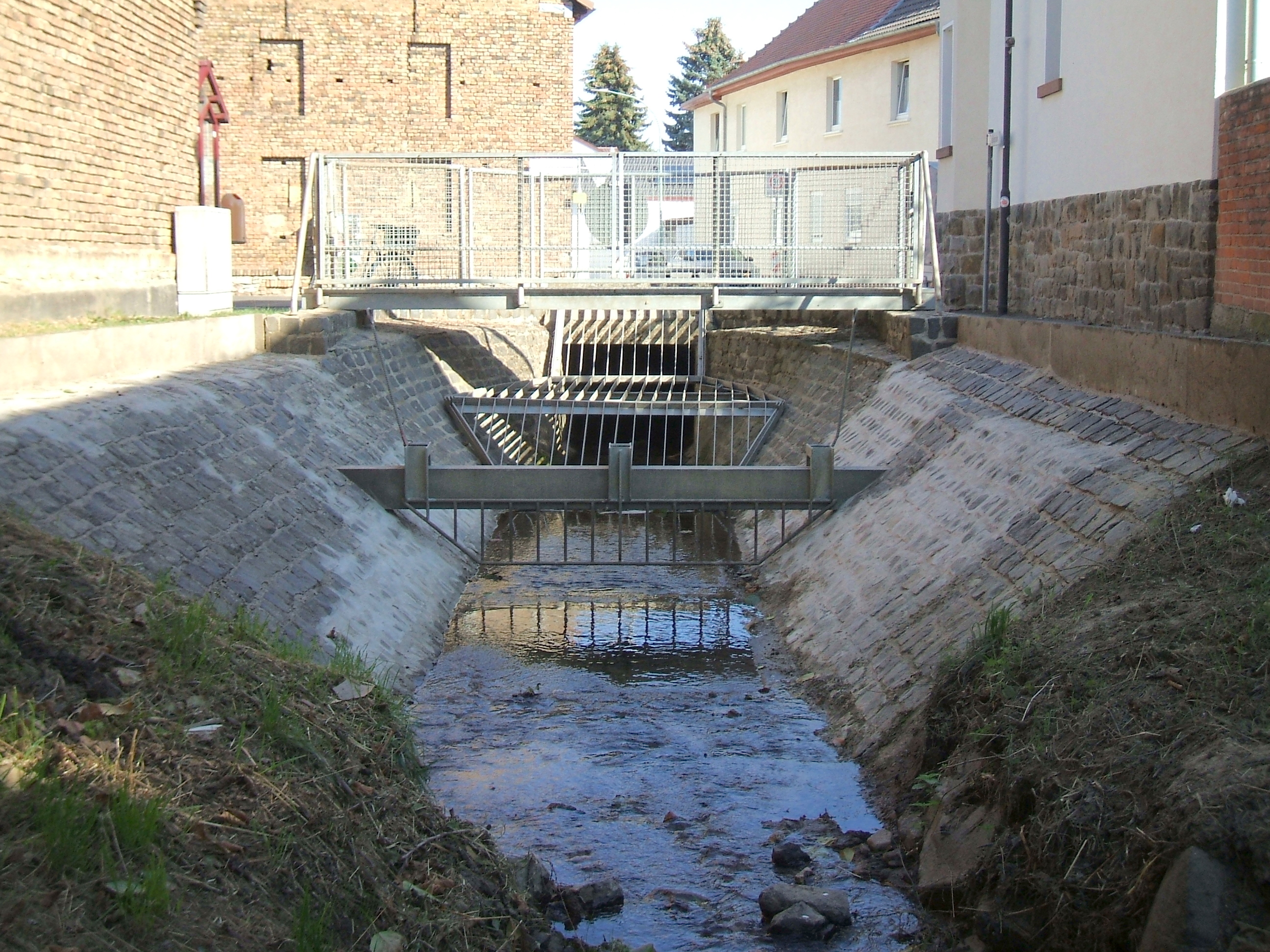 Nach Abschluss der Renovierungsarbeiten fließt der Leihgraben in die an der Friedberger Straße, Hintergrund, beginnende Verrohrung des Beunebachs